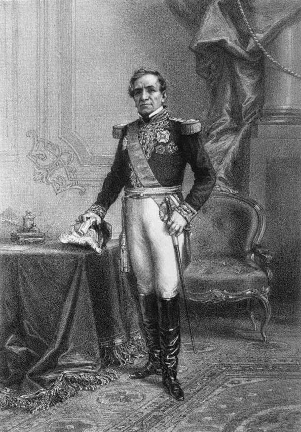 "Le Maréchal de Santa-Cruz"